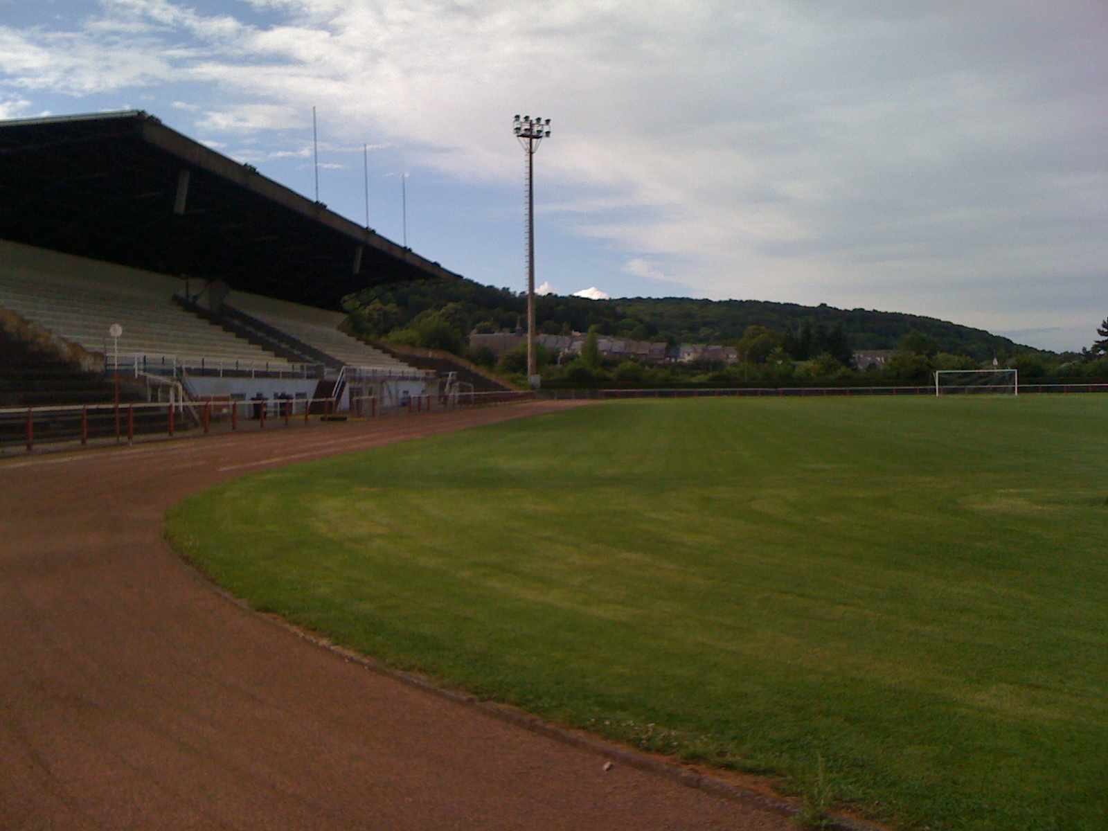 Photo du stade Municipal CS Obercorn